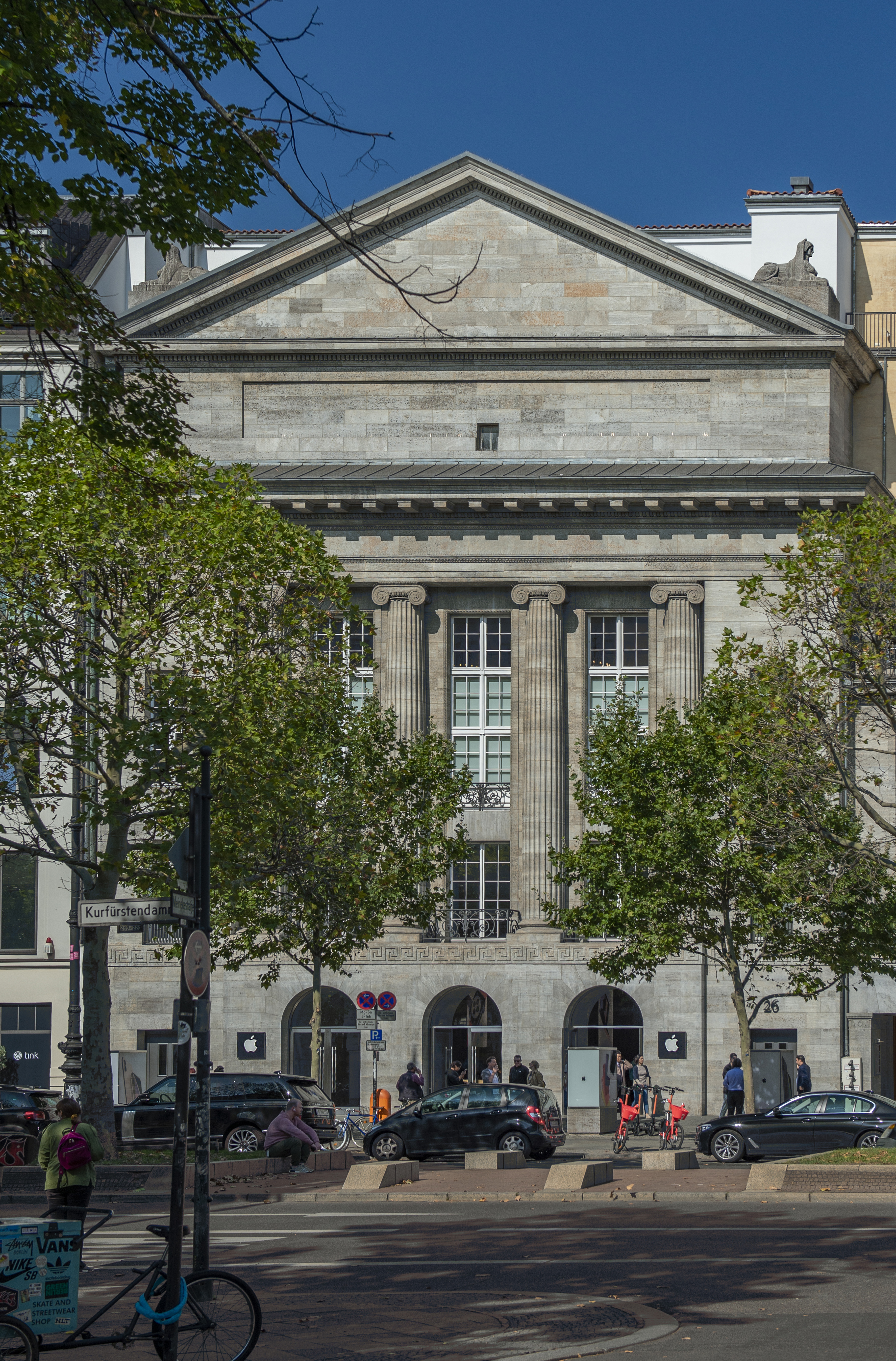 Union-Palast (ehem.) & Haus WienThis is a photograph of an architectural monument.